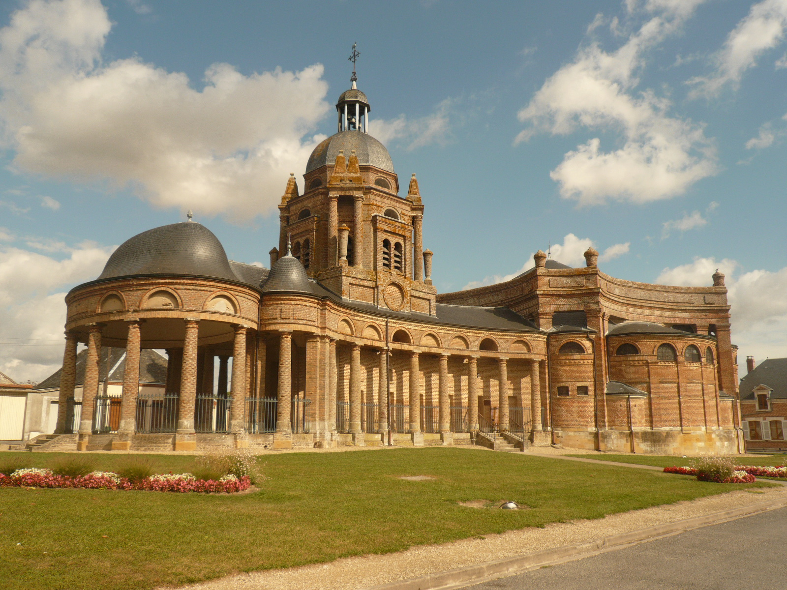 Eglise Saint-Didier du XVIIe siècle, protégée au titre des Monuments Historiques le 3 mai 1913